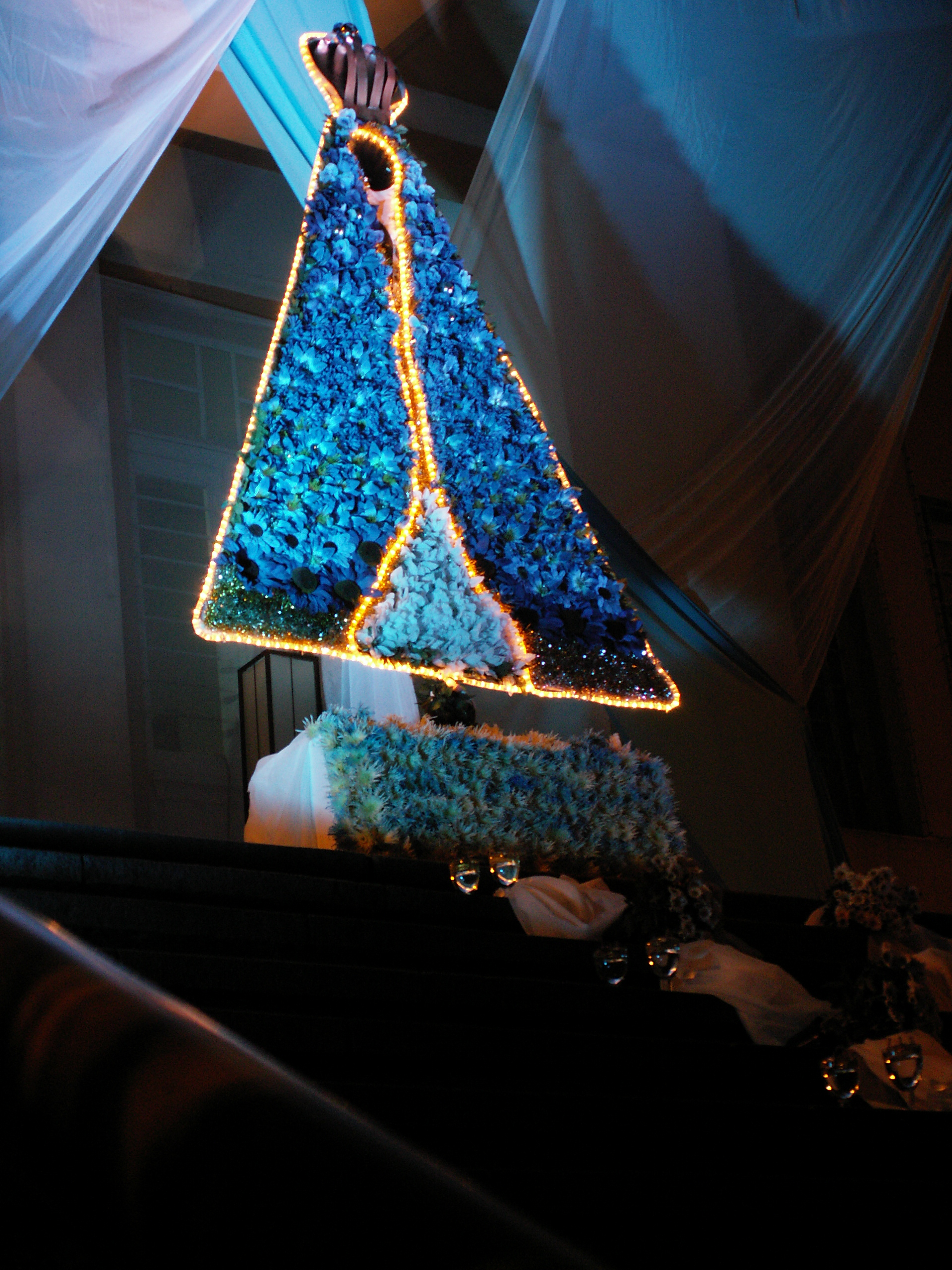 Matka Boża z Aparecida